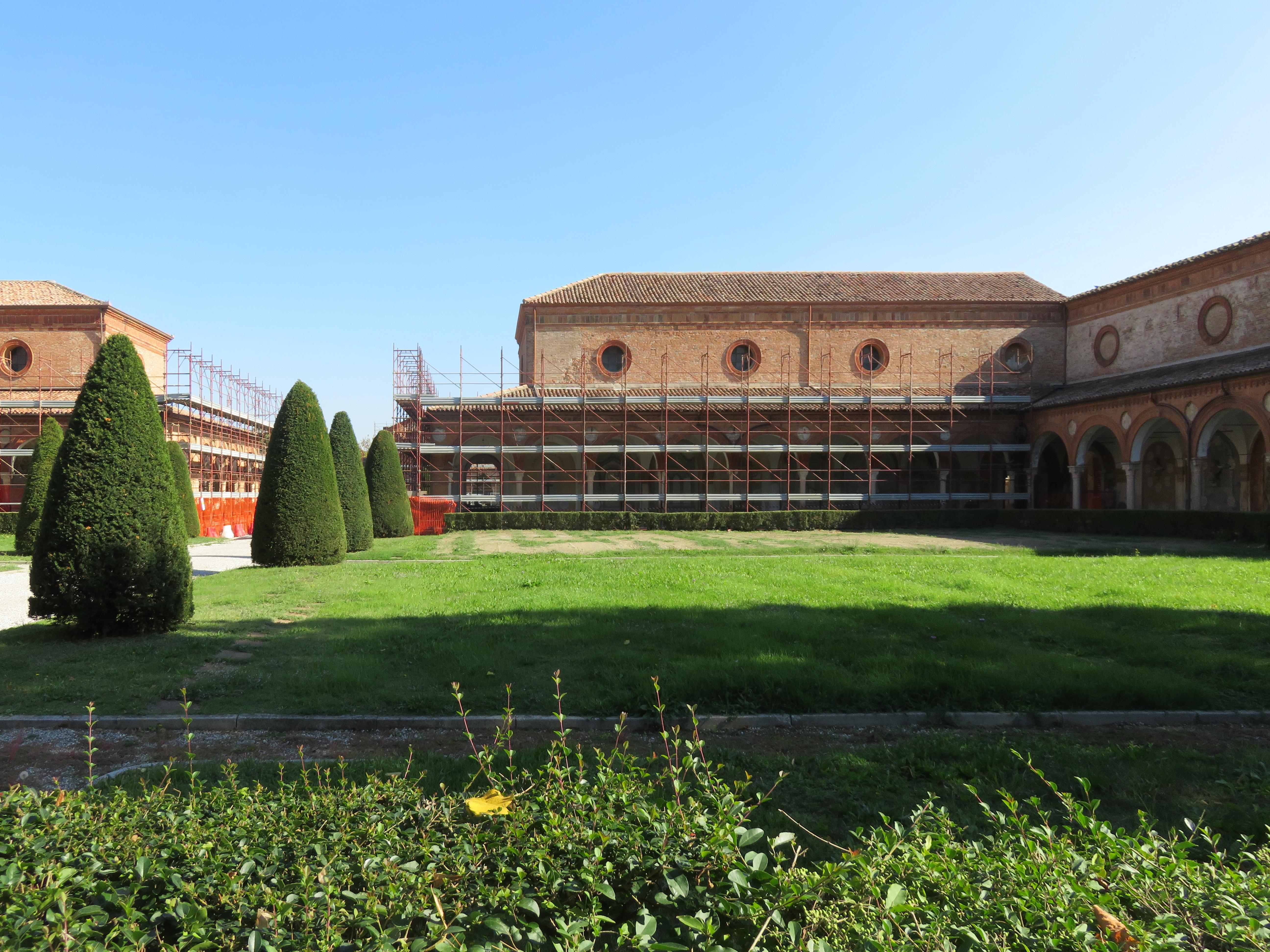 lavori dopo il terremoto in Certosa